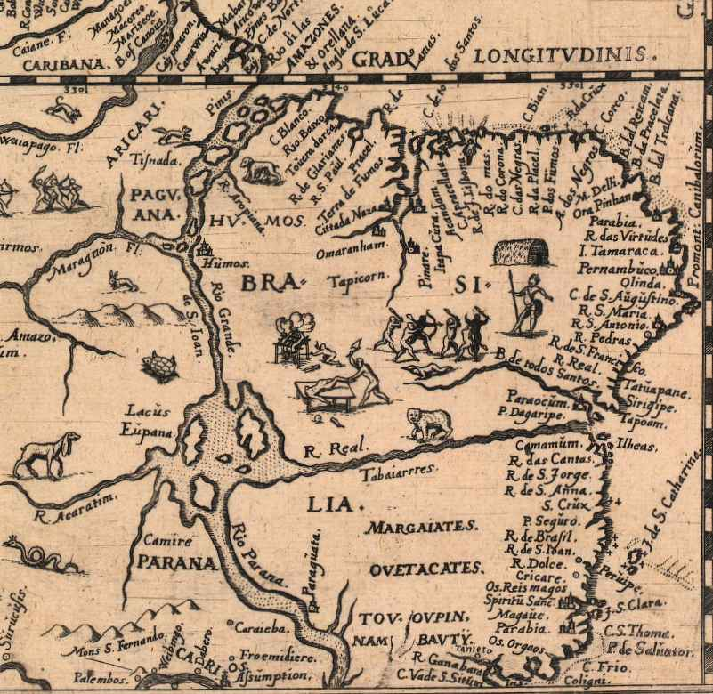 Brazil - Old map